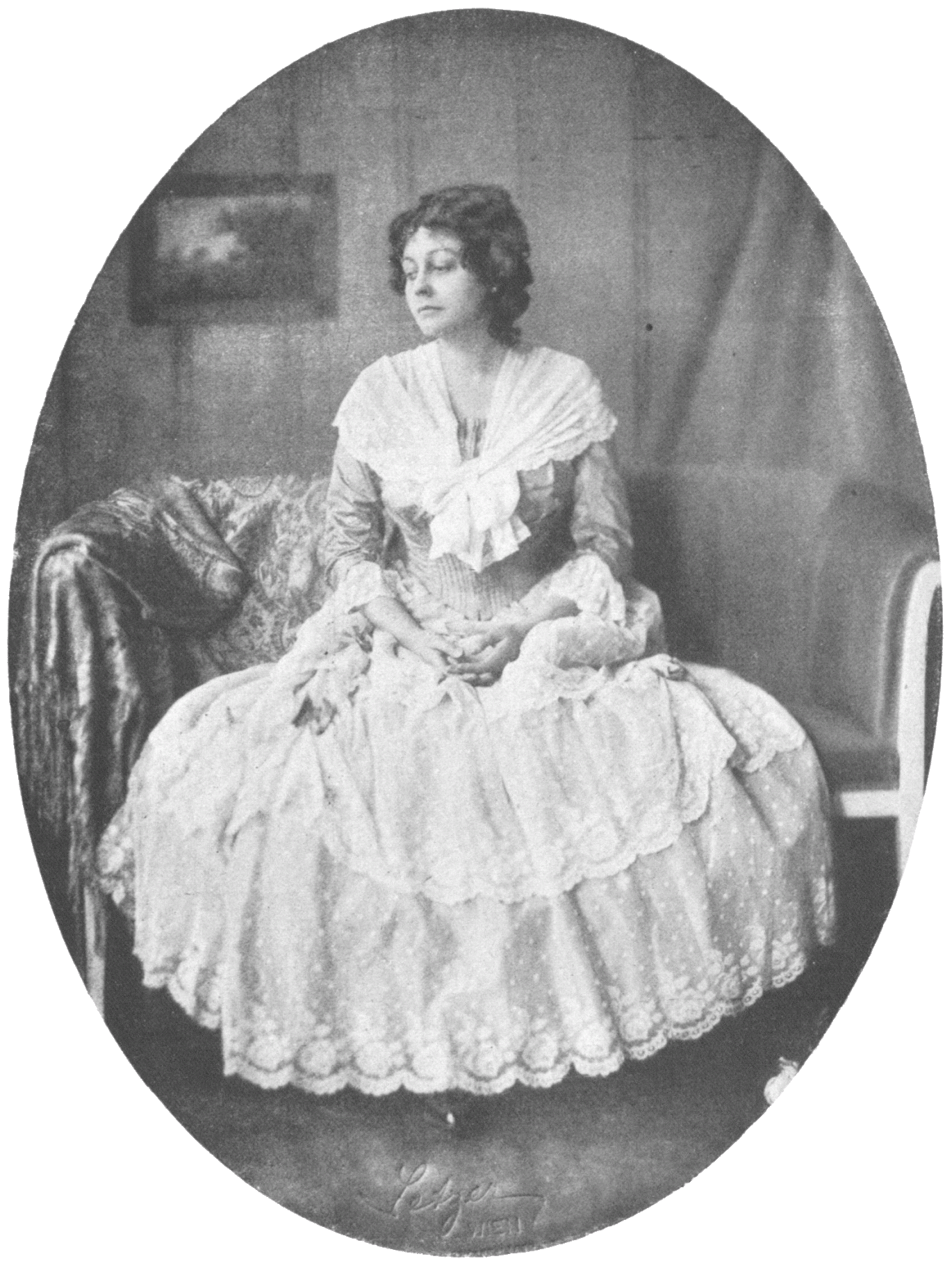 Annemarie Steinsieck (1889—1977), German actress